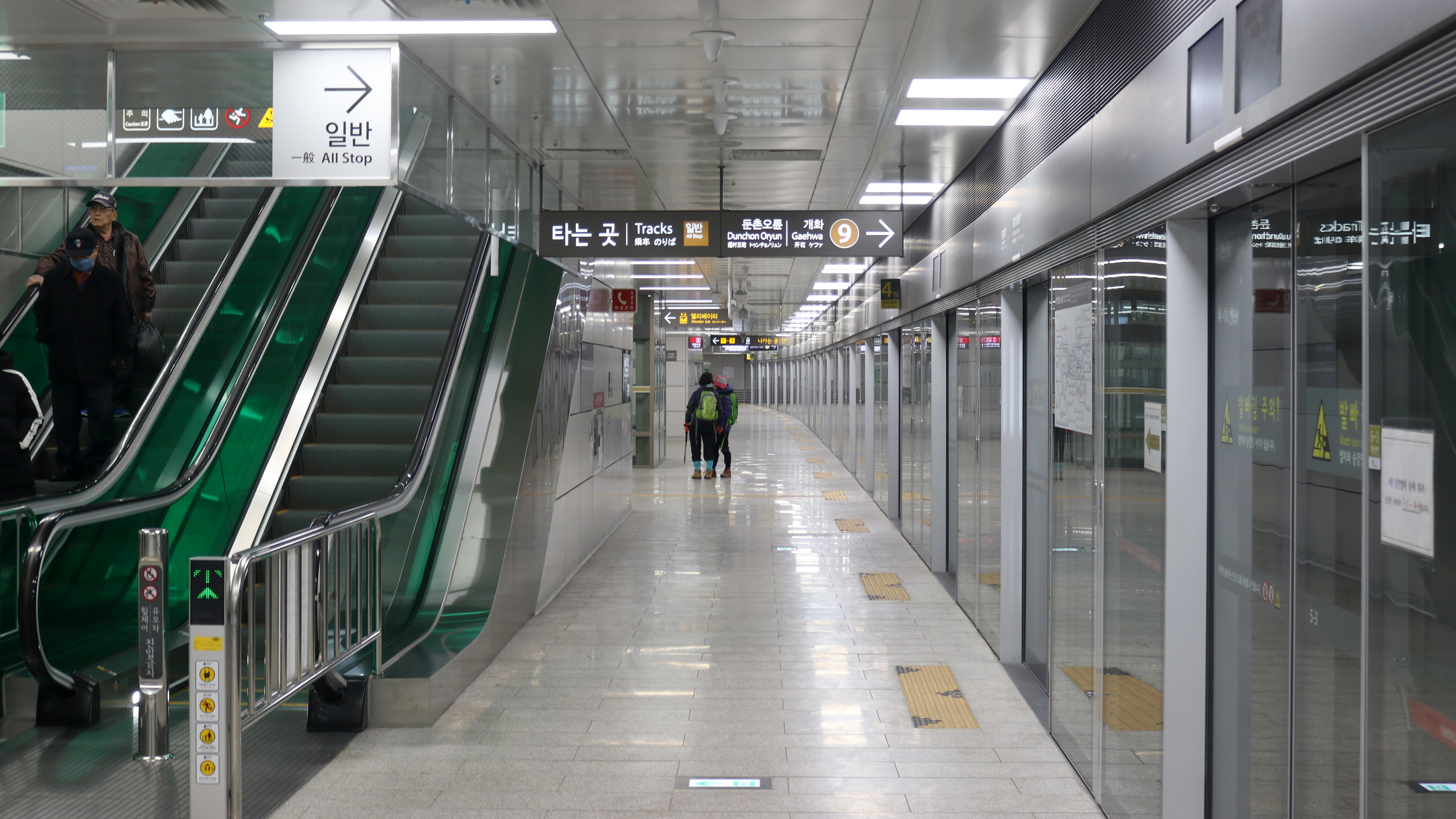 중앙보훈병원역 승강장